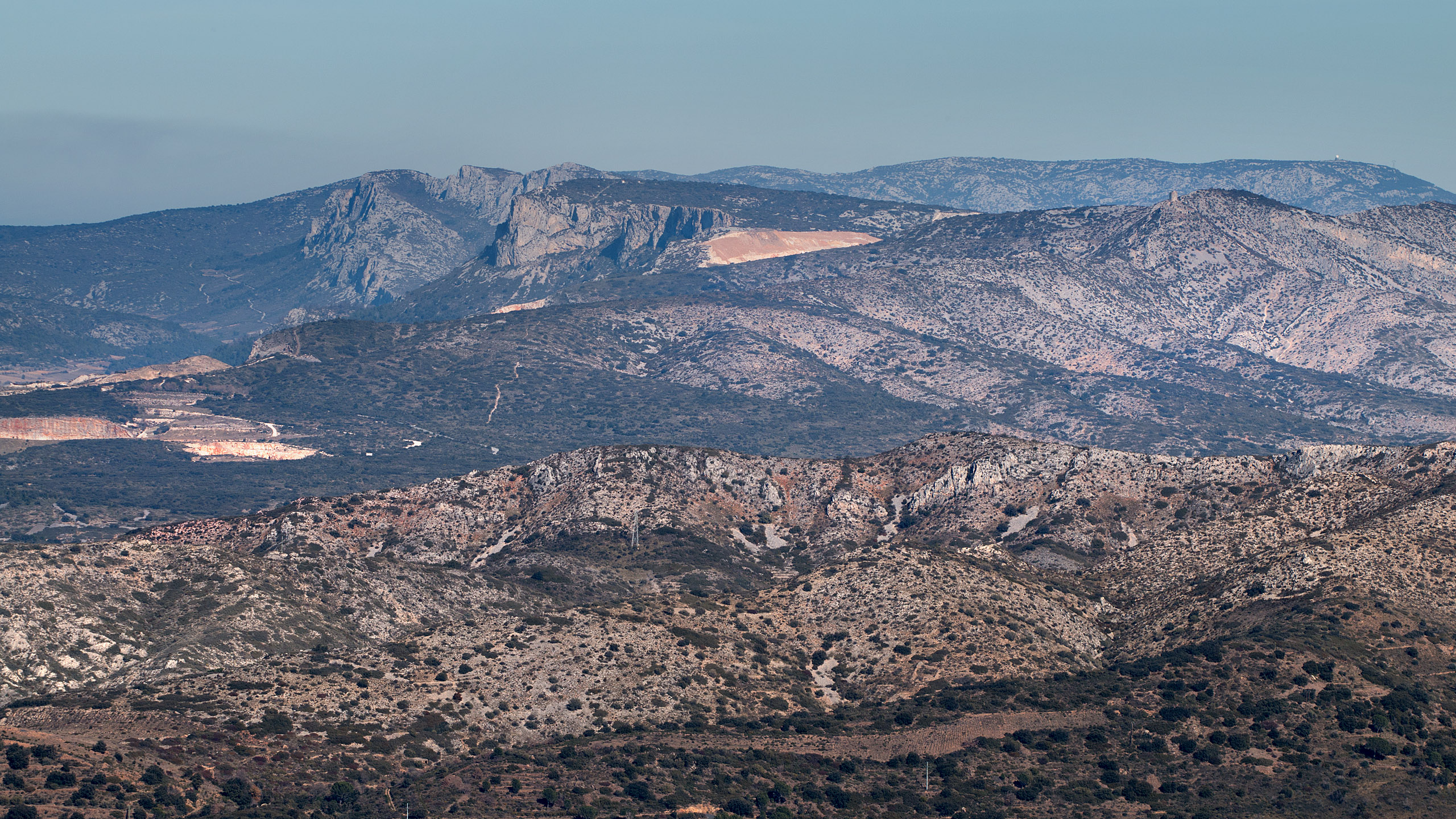 Vue du sud ouest